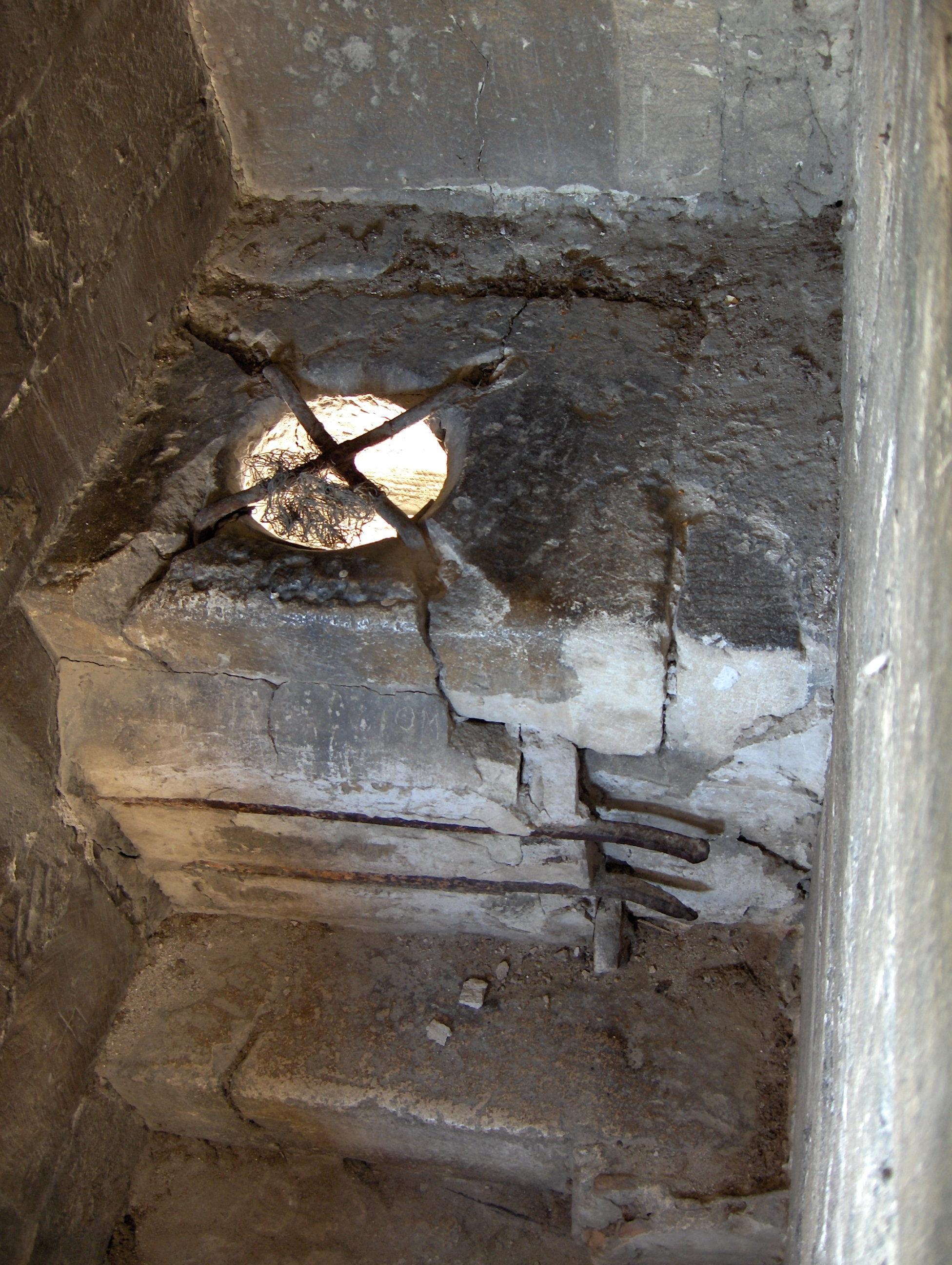 Het gemak een middeleeuws toilet of W.C.